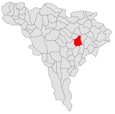 Categorie:Hărţi ale judeţului Alba